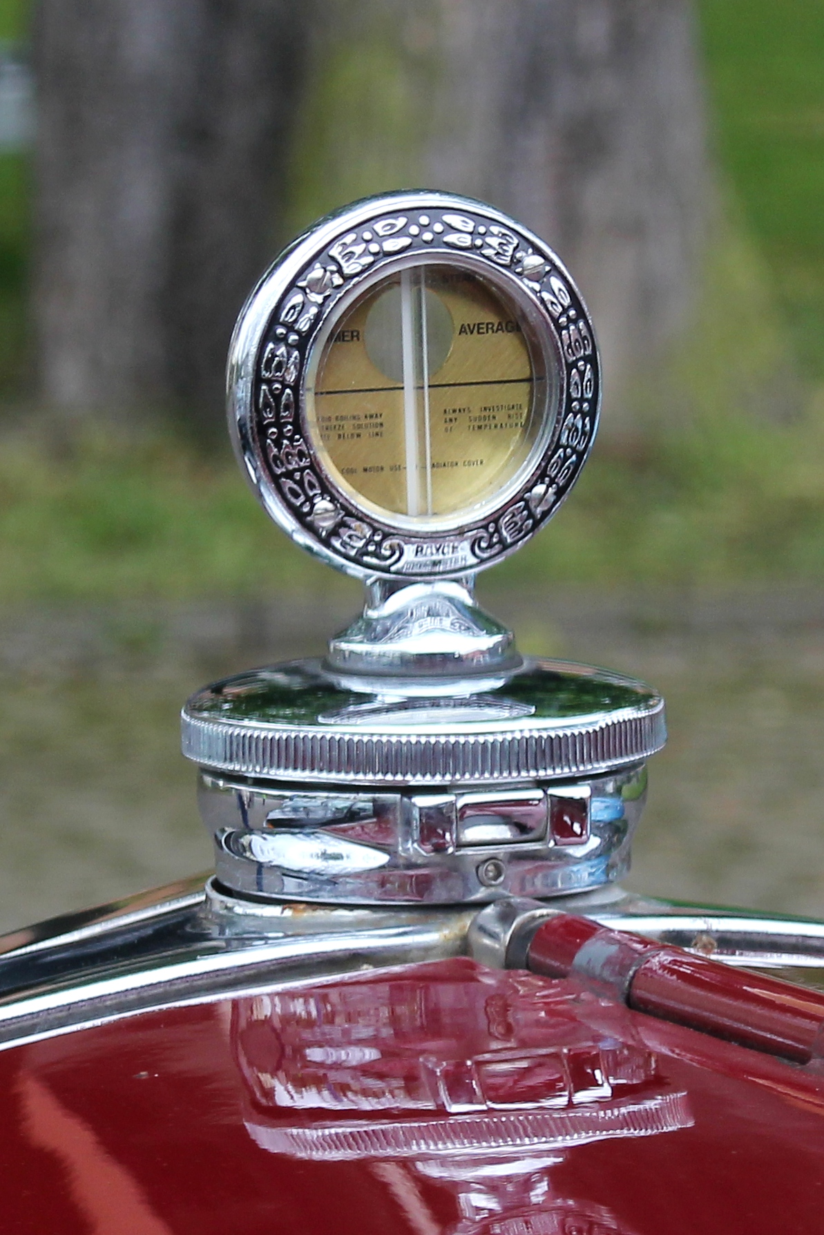 Boyce-Kühlerthermometer an einem Ford Modell A, Baujahr 1929